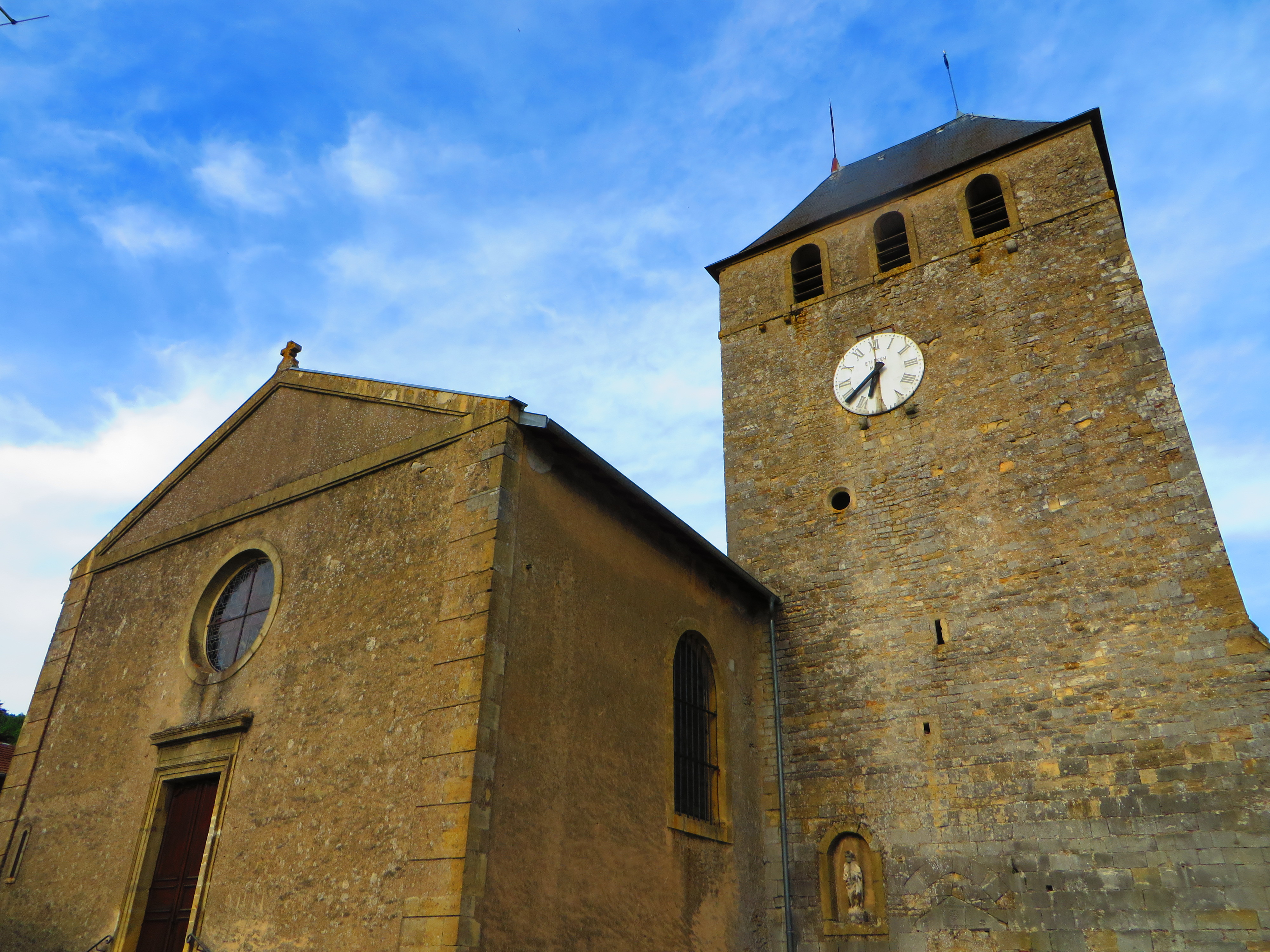 Onville église Saint-Rémy